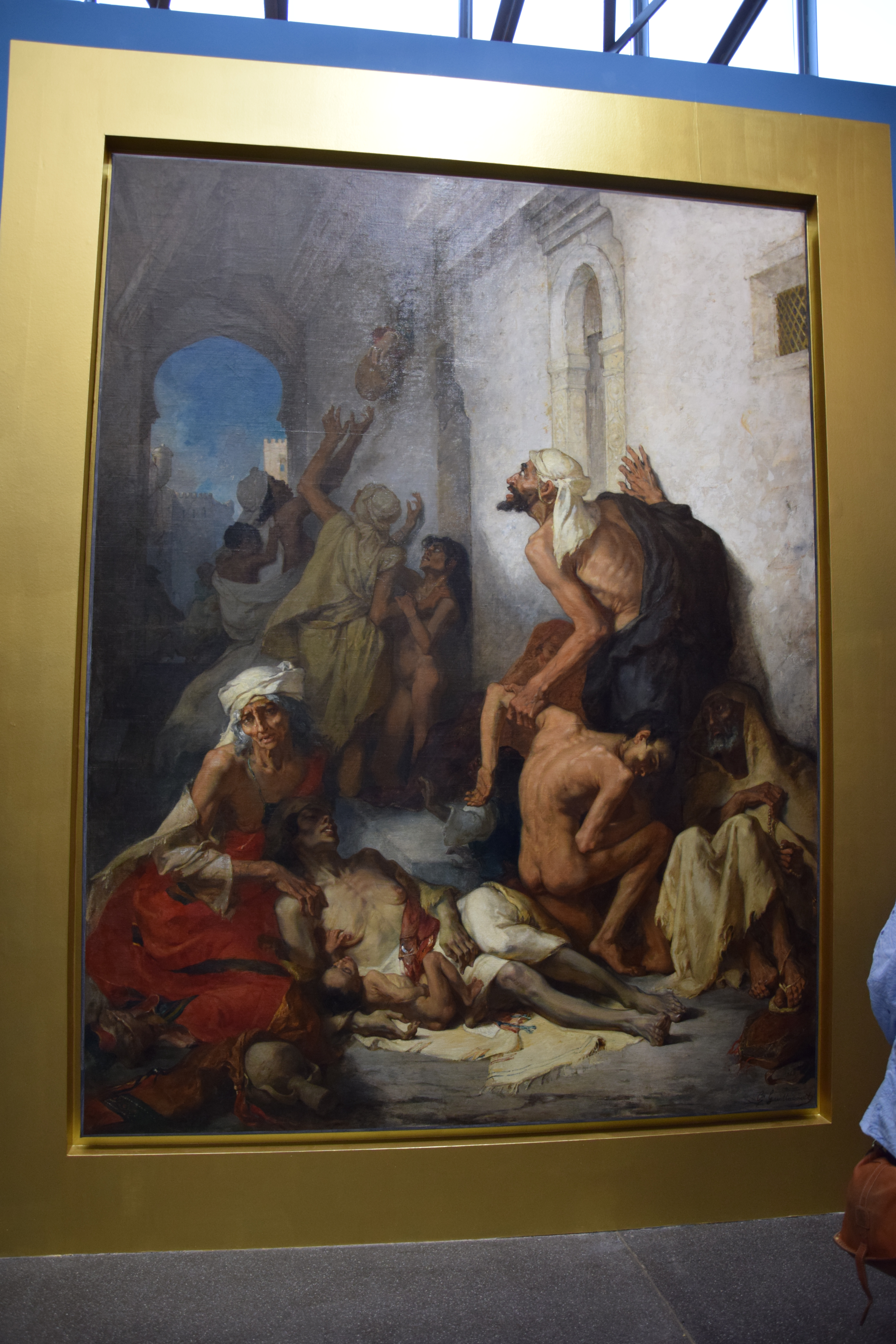 L'Algérie de Gustave Guillaumet (Roubaix, 2019)